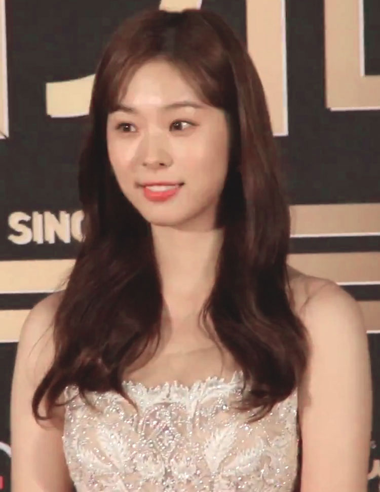 2017 KBS 연기대상 레드카펫 '황금빛 내인생' 서은수